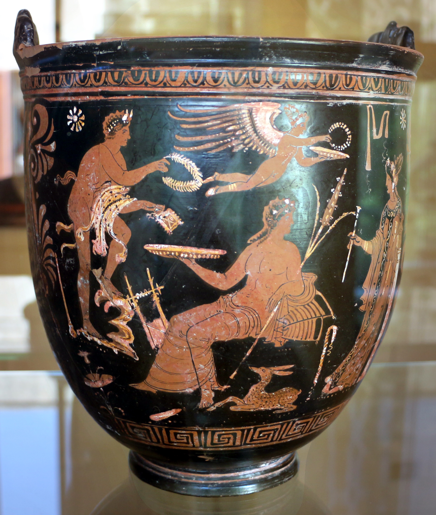 Convento di Santa Chiara This is a photo of a monument which is part of cultural heritage of Italy.